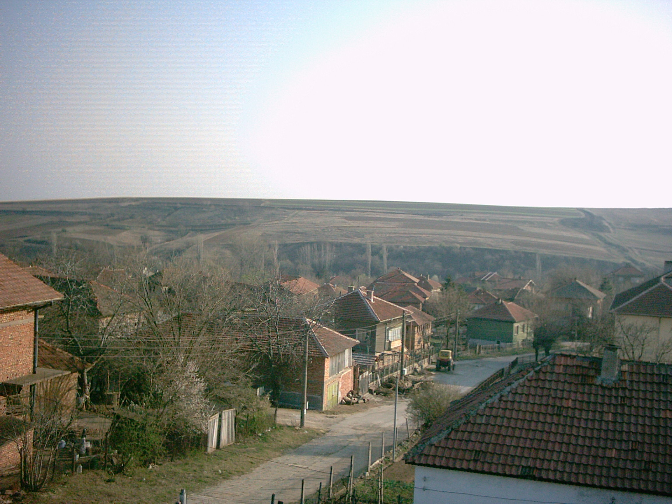 Изглед от село Винарово; © 2007 Стоян Иванов